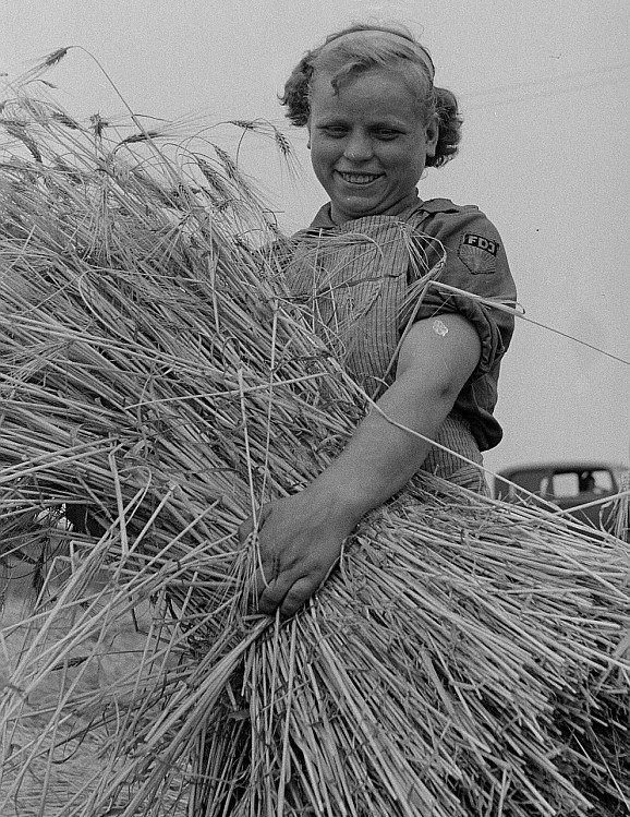 Original image description from the Deutsche Fotothek Junge Frau mit Garbe